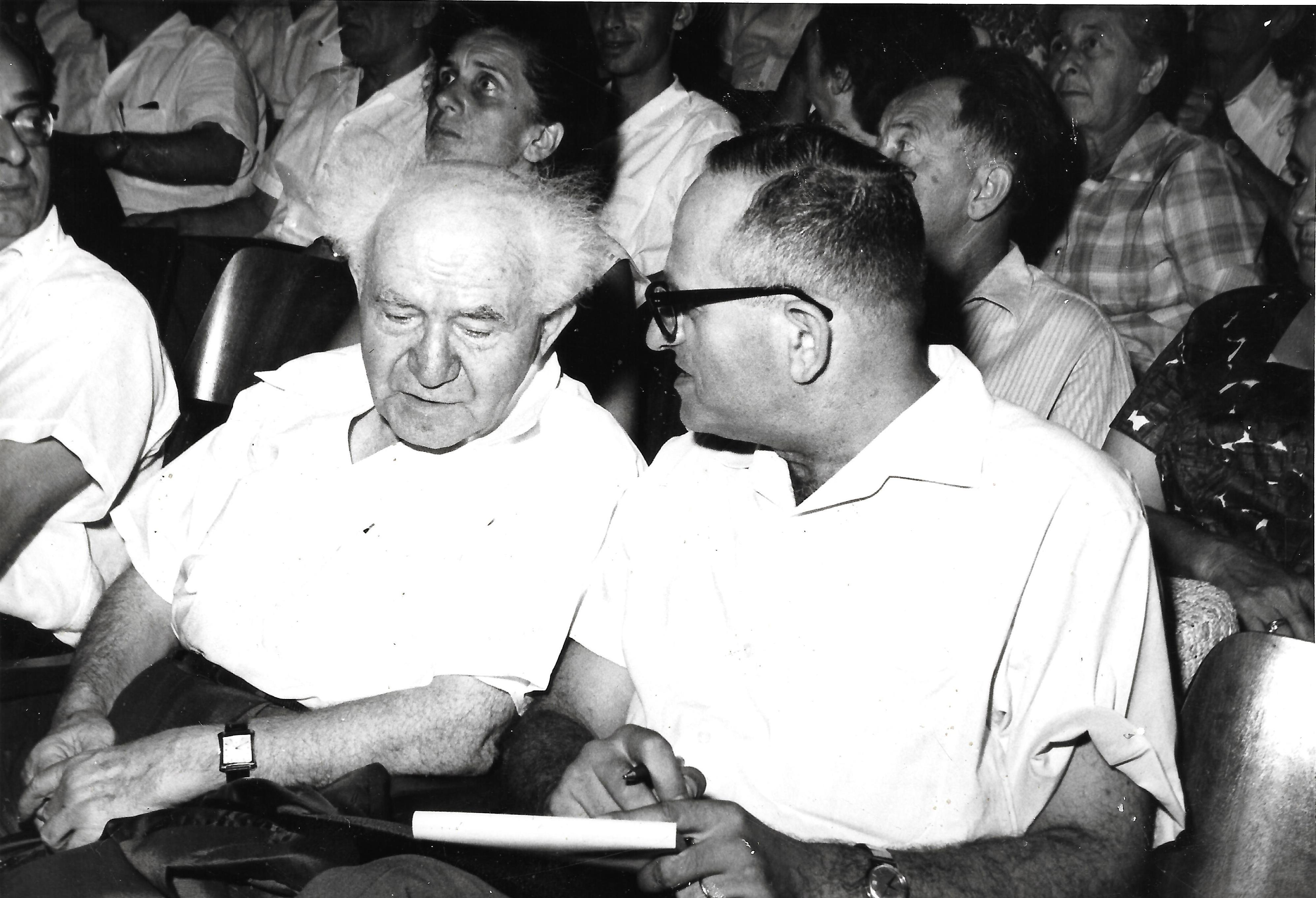 דוד בן גוריון ושלום לוין בוועידת הסתדרות המורים ב-1962